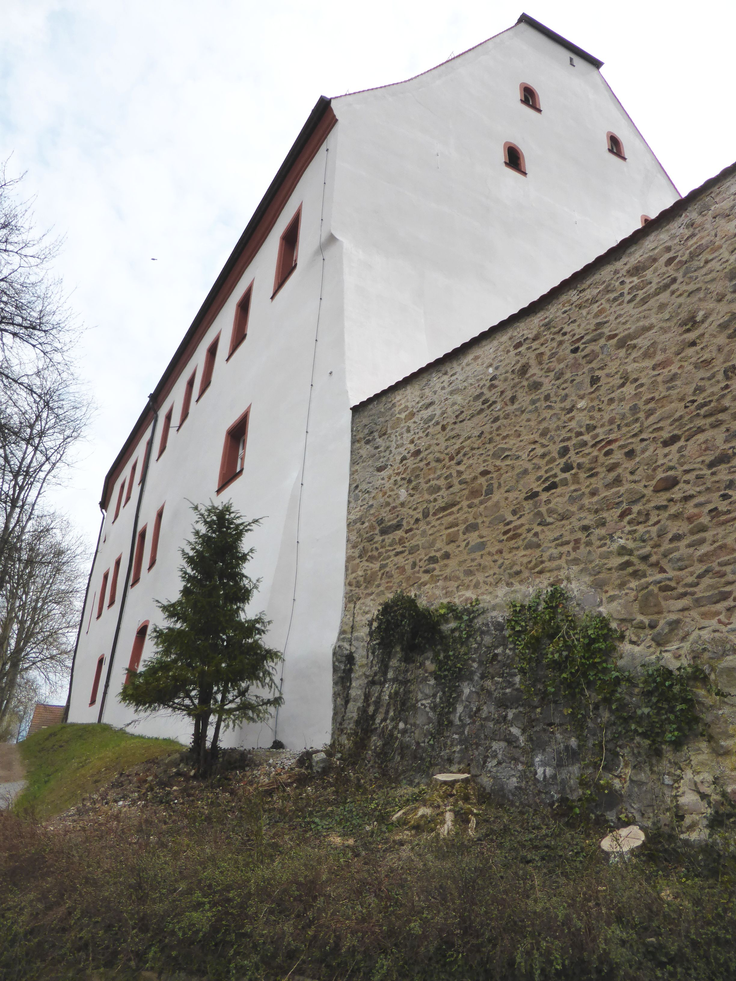 Nabburg (Pflegschloss) Rückseite